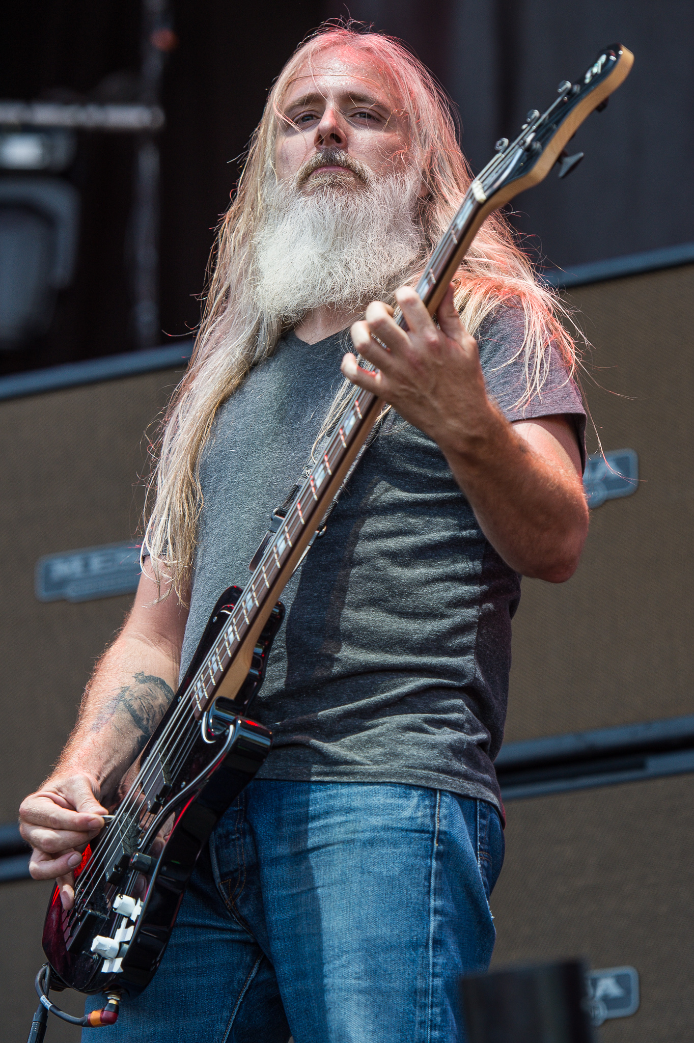 ARGO-Konzerte,Beck's Park Stage,Festival,John Campbell,Konzert,Lamb of God,Livekonzert,Livemusik,Musik,RiP,Rock im Park 2015